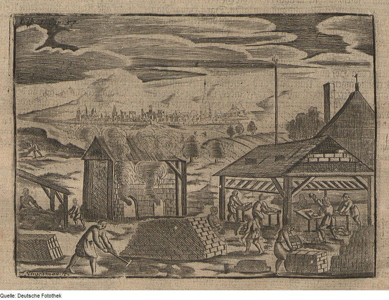 Original image description from the Deutsche Fotothek Bauwesen & Baustoff & Ziegel